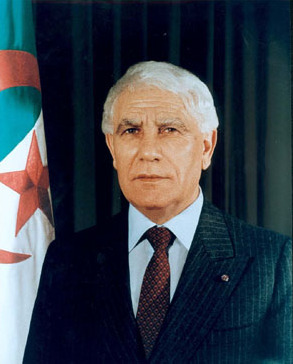 Offizielles Photo des ehemaligen Staatspräsidenten von Algerien Chadli Bendjedid (* 1929)